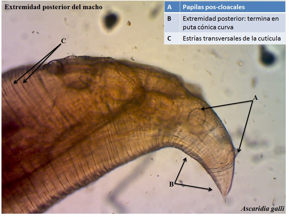 extremidad posterior del nematode ascaridia galli macho